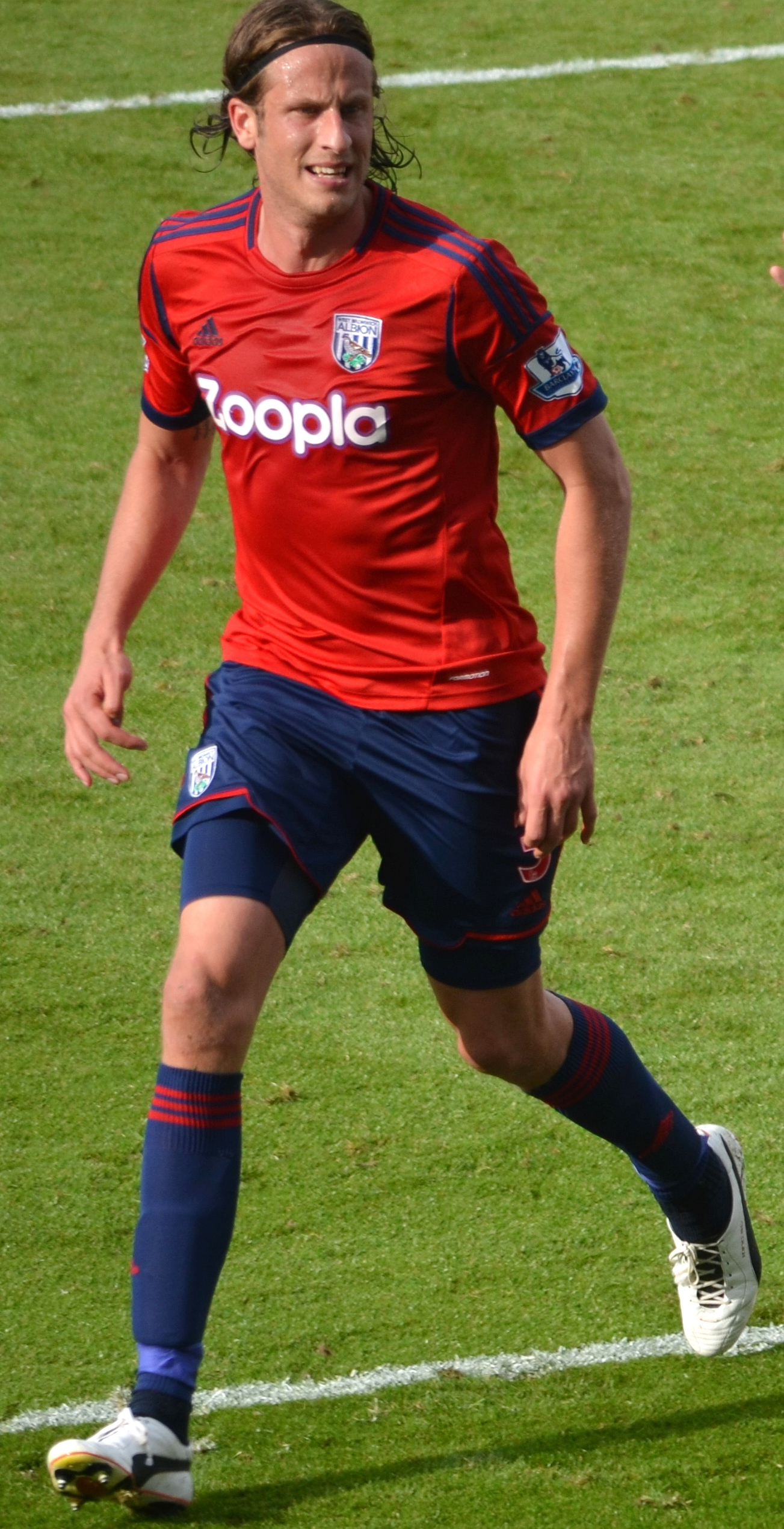 Craven Cottage, September 2012